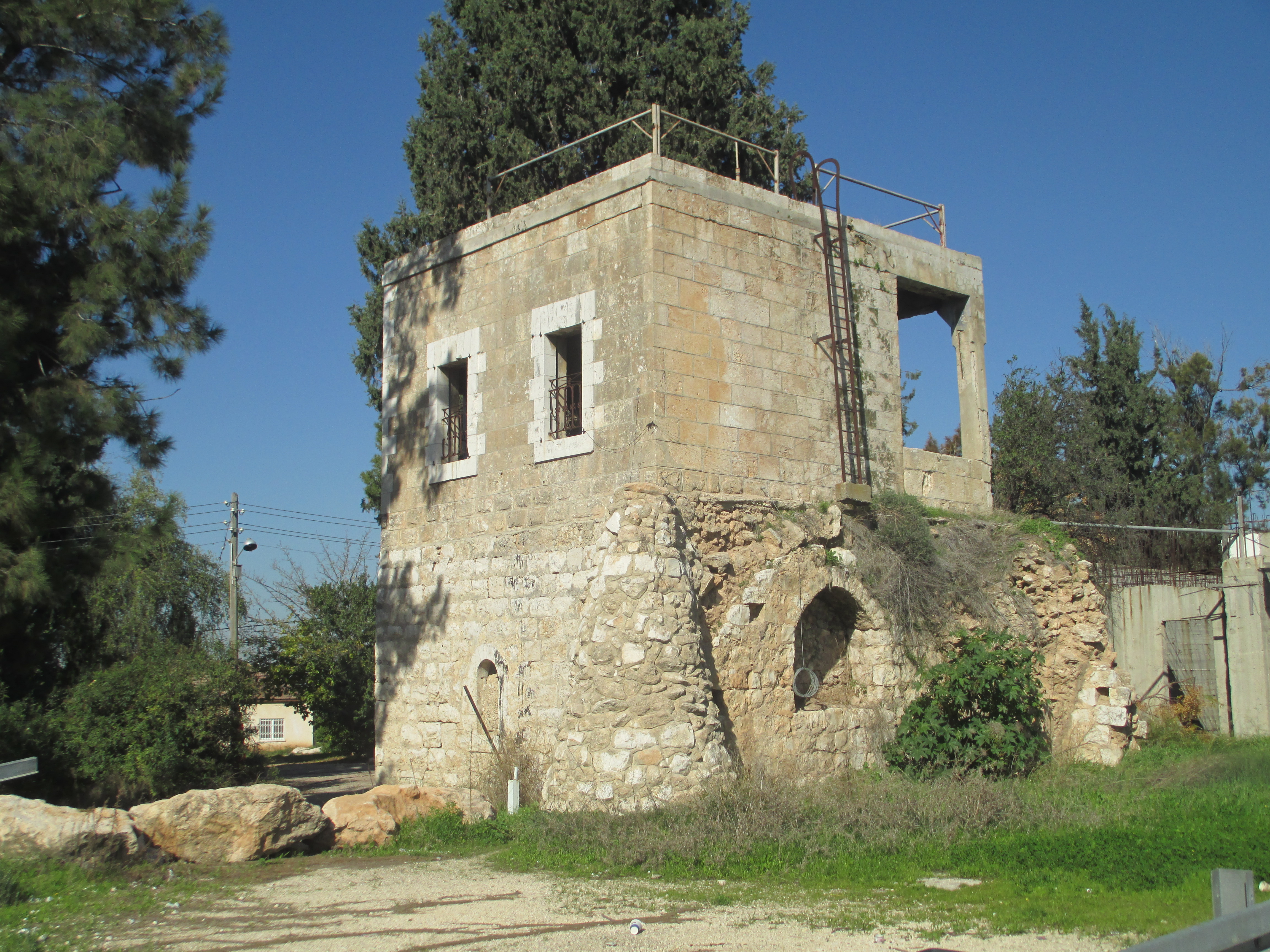 בית ערבי נטוש בכפר דניאל